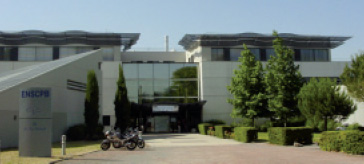 Photo de l'entrée de l'École nationale supérieure de chimie, de biologie et de physique.